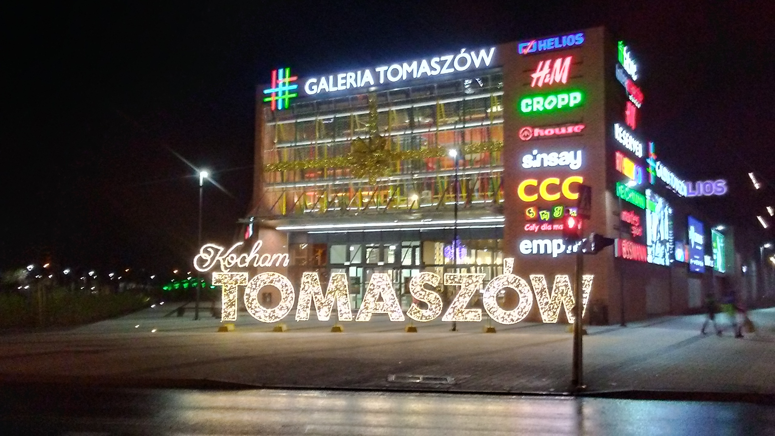 Tomaszów Mazowiecki w województwie łódzkim, PL, EU. Galeria handlowa „Tomaszów” Grudzień 2019 roku. CC0